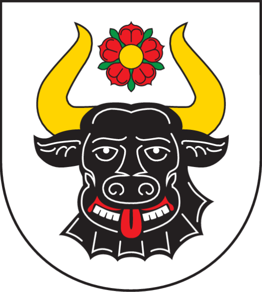 Herb gminy Zwierzyn